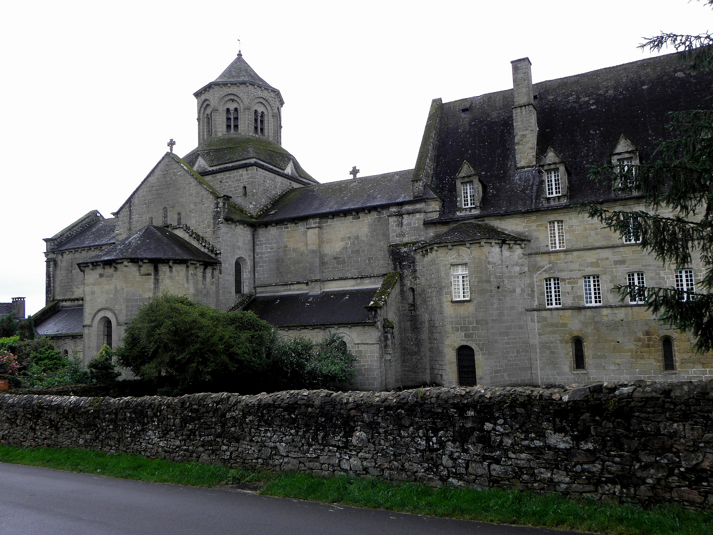 Abbaye d'Aubazine (19).